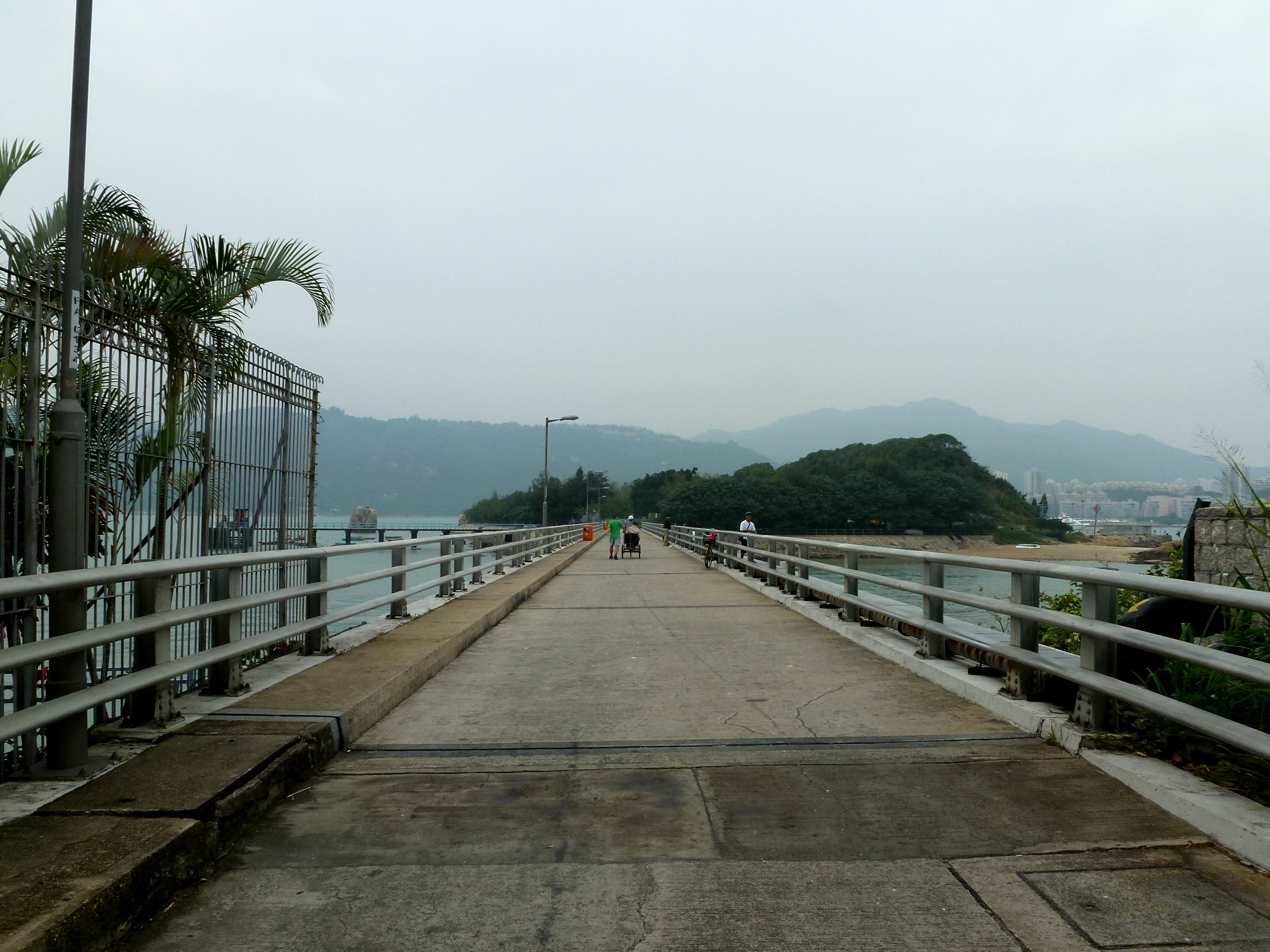 Tai Lei Peng Chau Island Hong Kong